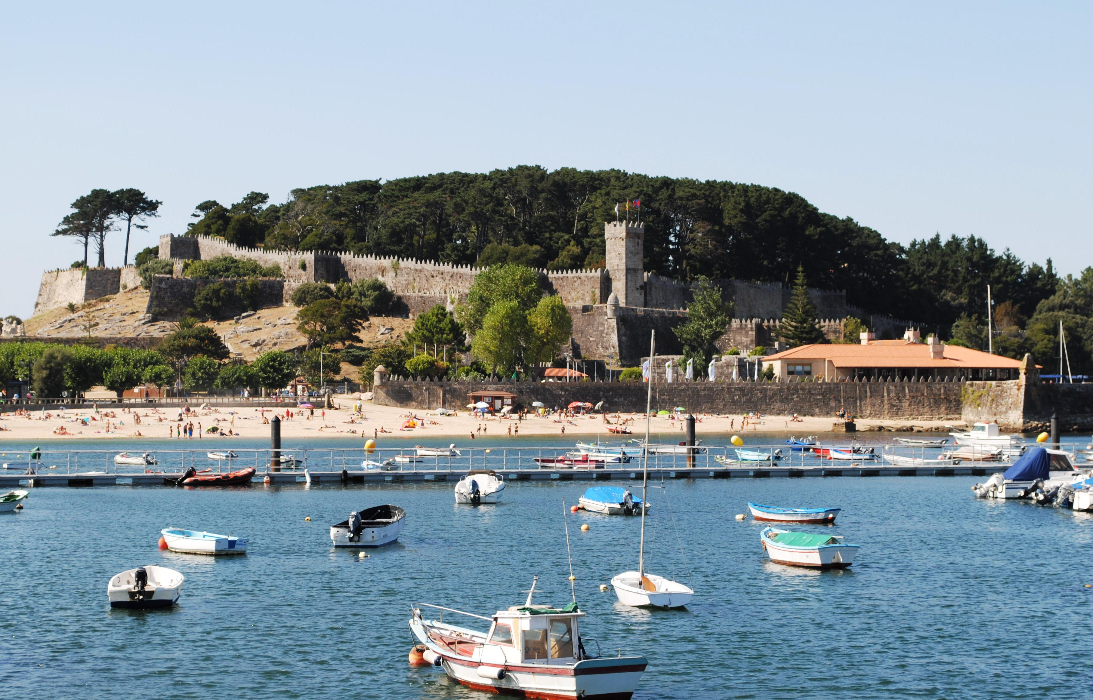 Véxase o título e as categorías